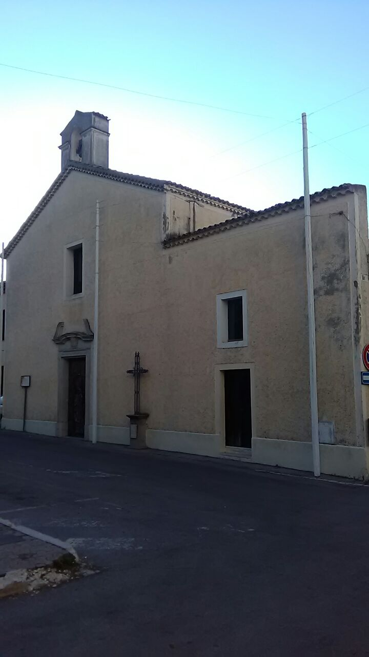 Chiesa di san Rocco situata a Pignola.